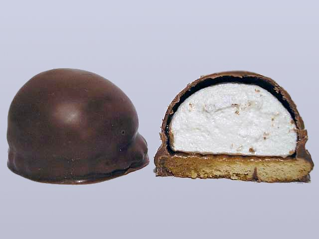 Melo Cake of Mallo met doorsnede